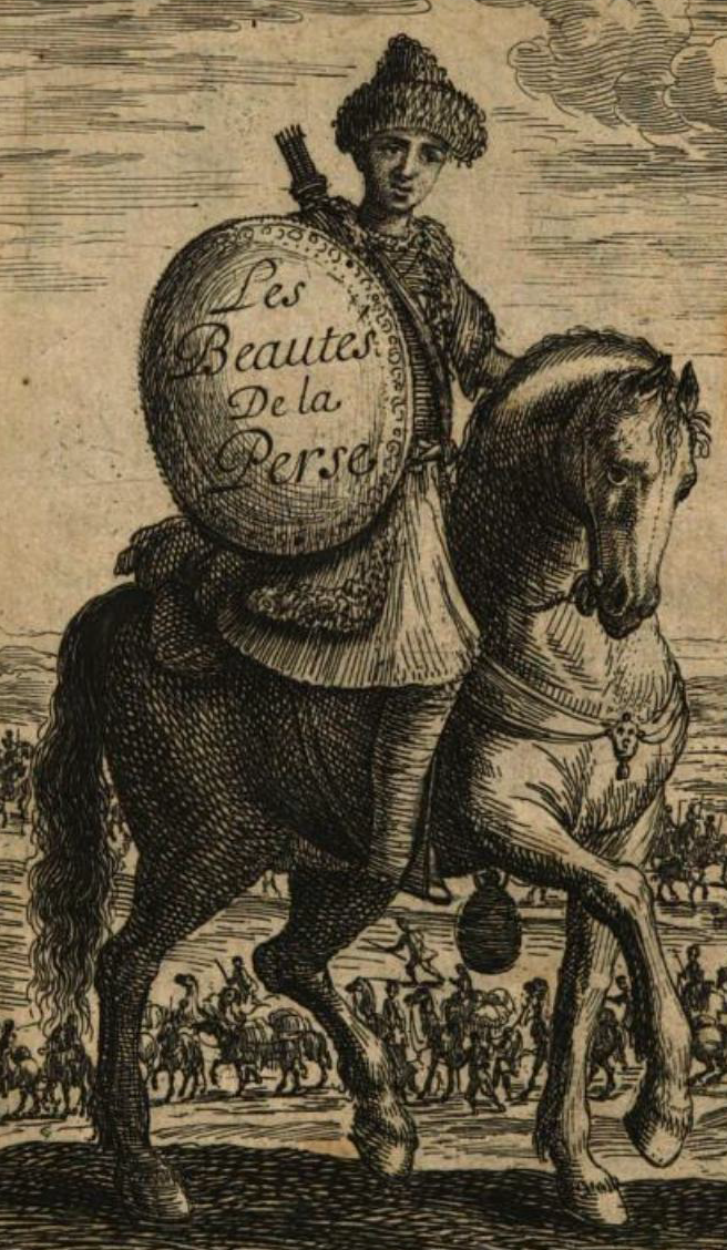 Gravure dessinée par André Daulier Deslandes, tirée de son livre « Les Beautez de la Perse, ou la description de ce qu'il y a de plus curieux dans ce Royaume, enrichie de la Carte du Païs, & de plufieurs Eftampes deffignées fur les lieux. » qui représente un cavalier tenant un bouclier sur lequel on peut lire « Les Beautés de la Perse » qui est armé d'un carquois en bandouillère. Une gourde prend à son côté. Il est vêtu d'un habit perse (iranien). Derrière, on voit la caravane « de six cents chameaux et presqu'autant de chevaux » qu'il a joint à Tauris (Tabriz). Il est presque certain que le cavalier représente André Daulier Deslandes, car la légende de cette gravure dit « Ou ce qu'il y a de plus beau dans ce royaume est descrit et dessigné au naturel par le Sr. Daulier Deslandes, Vendomois. »